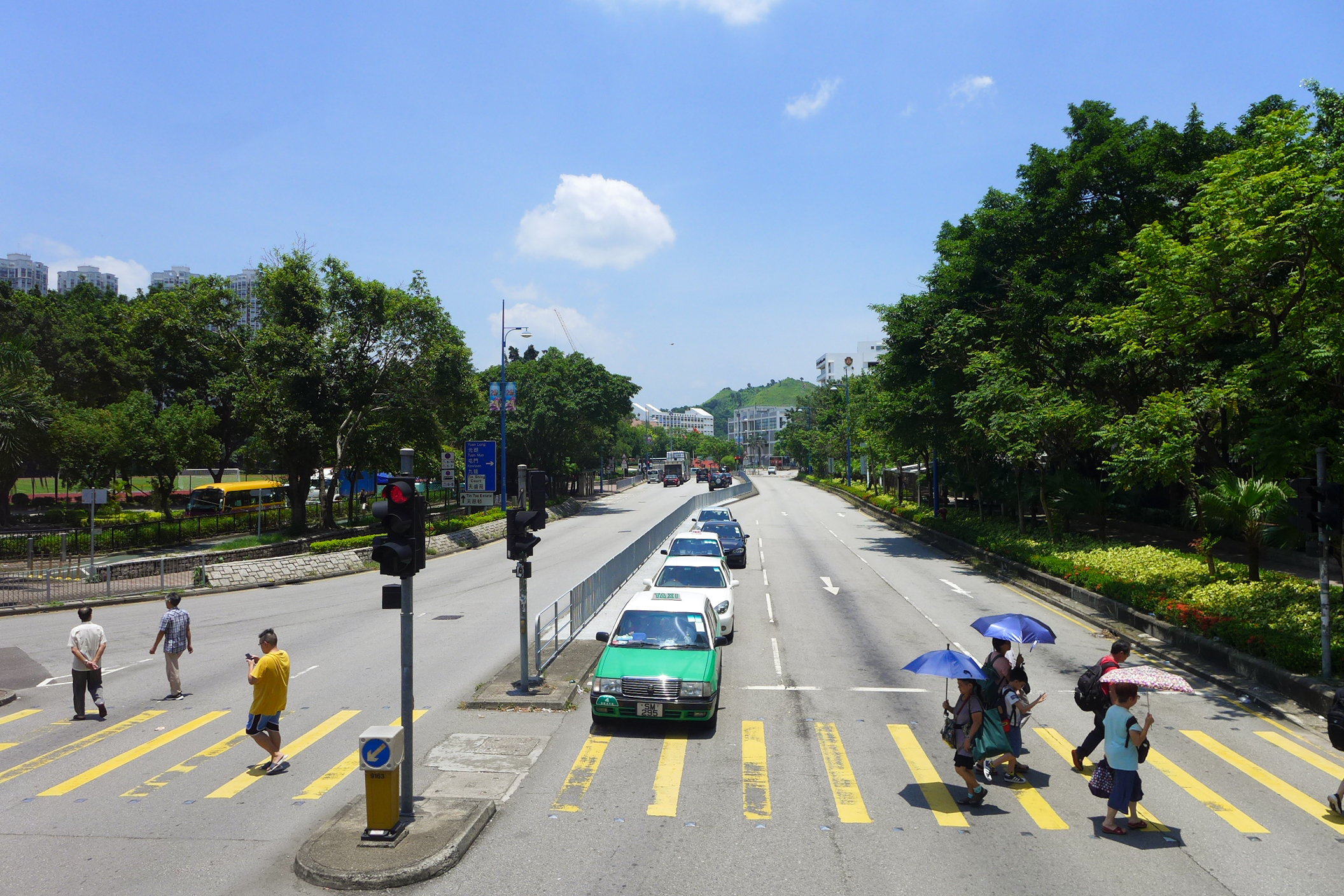 Tin Wu Road